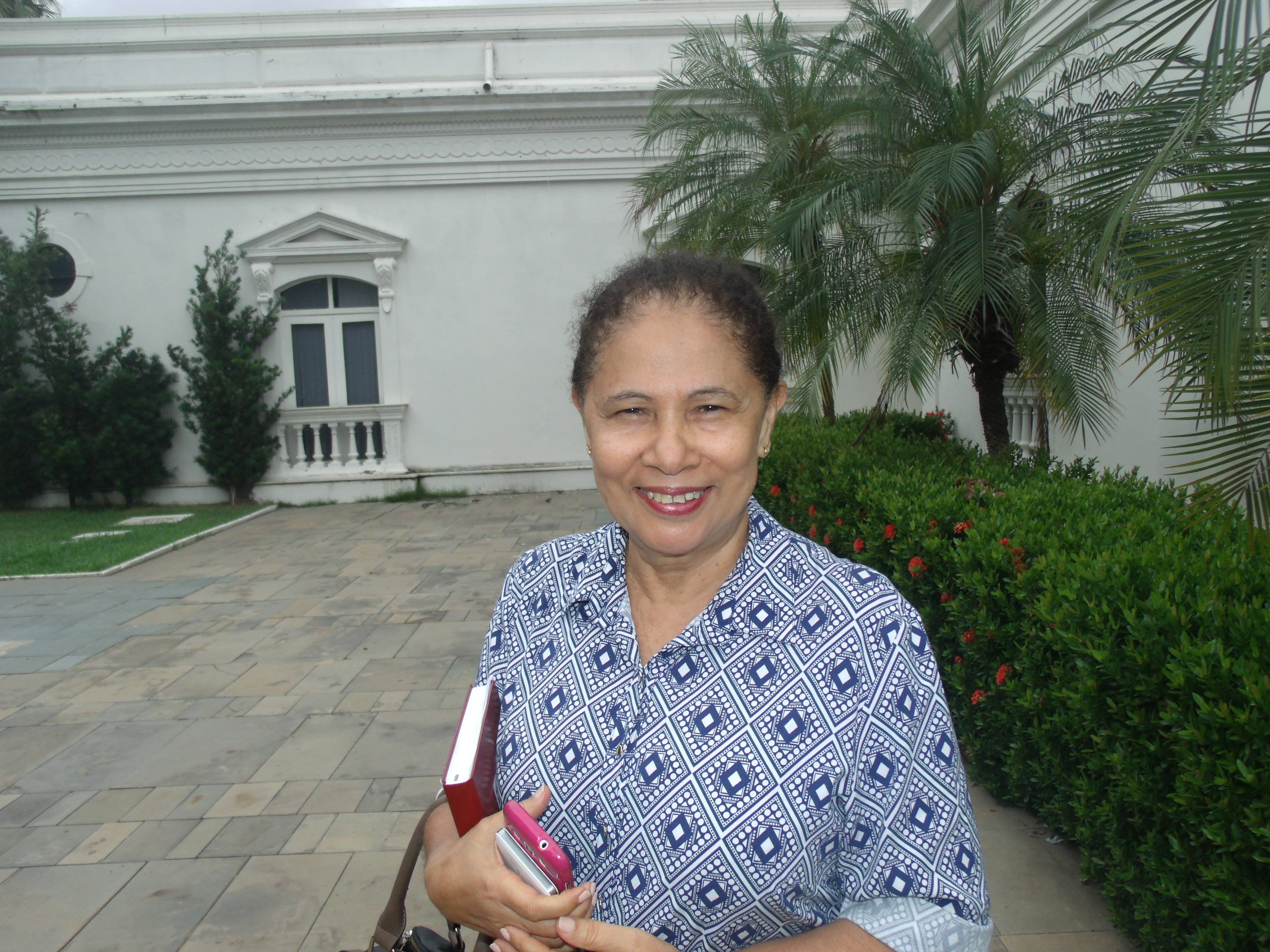 Regina Sousa, atual senadora pelo Piauí, nos jardins do Palácio de Karnak, em Teresina.